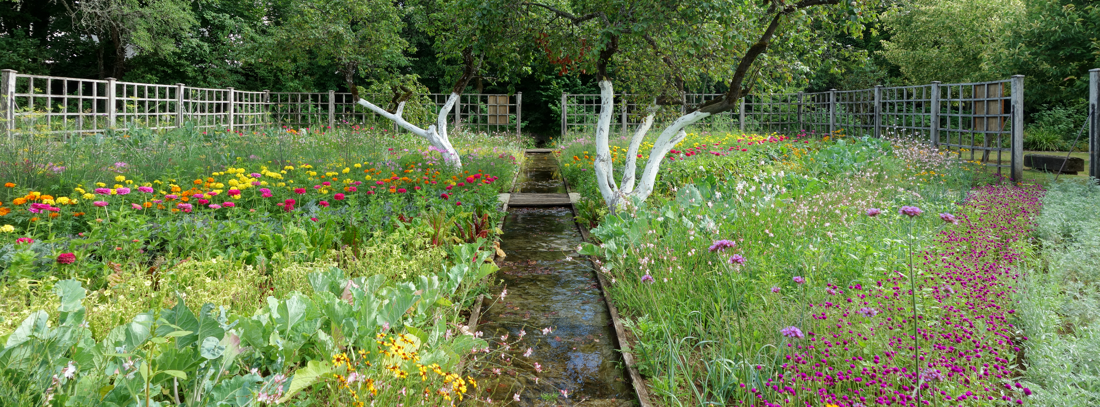 Le jardin du Château de La Trémolière aux Anglards de Salers.